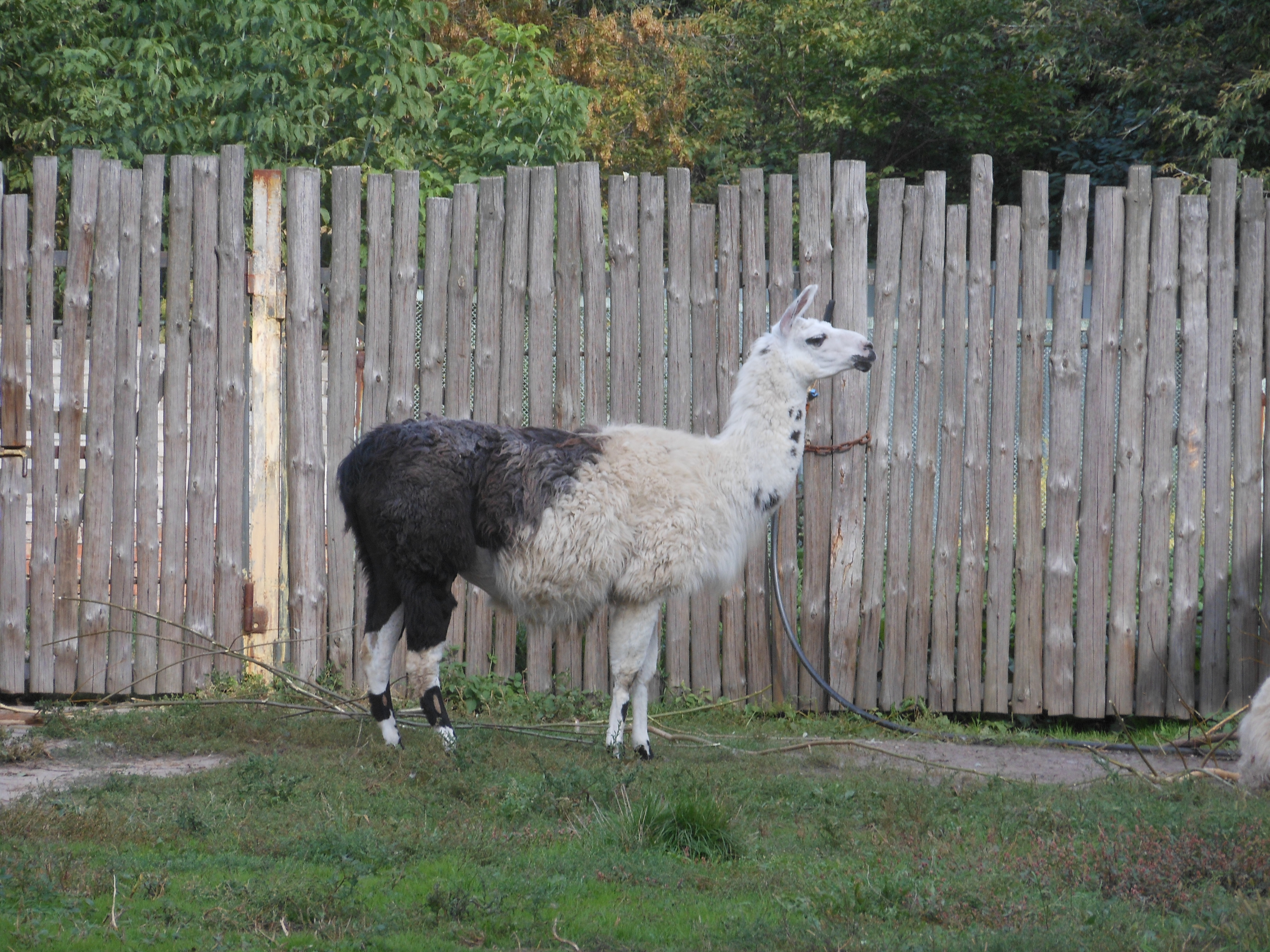 Київський зоопарк, Шевченківський район